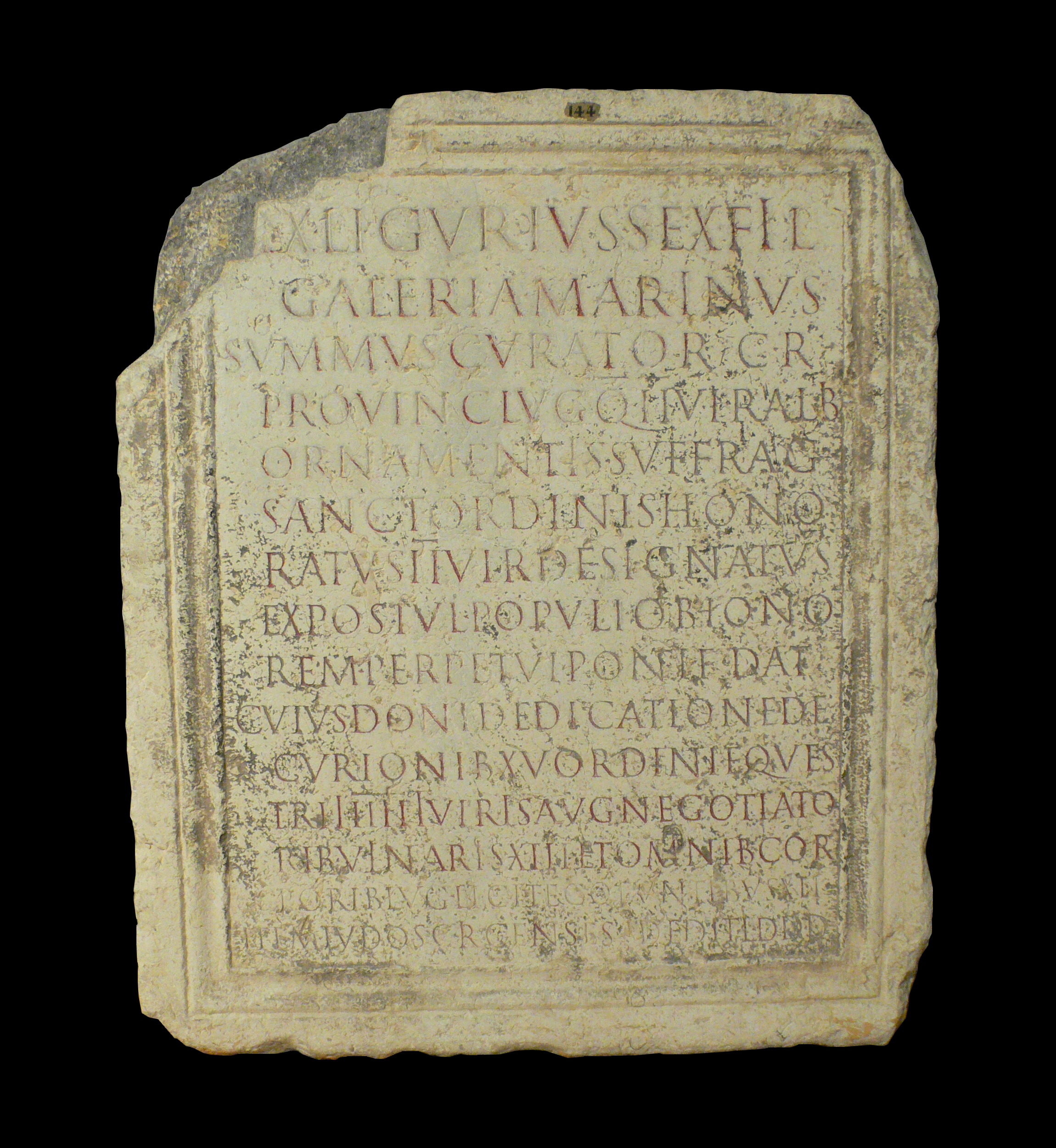 Musée gallo-romain de Fourvière (Lyon) : Inscription de Sextus Ligurius Marinus (Largeur : 112 ; hauteur : 134 ; profondeur : 43.5). Inscription de face